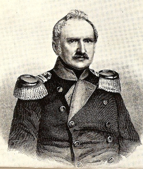 Zeitgenössisches Bildnis des hannoverschen Generals Carl Jacobi (1790-1875)